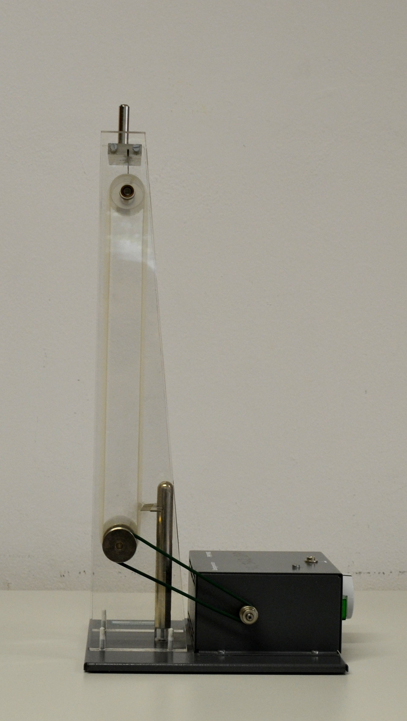 Bandgenerator - Seitenansicht ohne Konduktorhaube